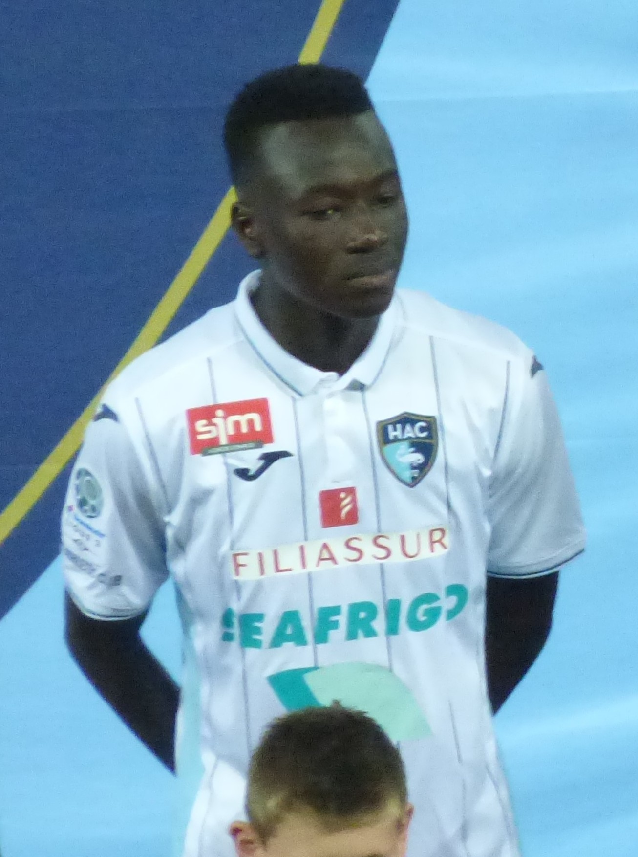 Pape Gueye avant le match Lens / Le Havre, comptant pour la 30ème journée du championnat de France de Ligue 2 2018-2019, le 1er avril 2019 au Stade Bollaert-Delelis.